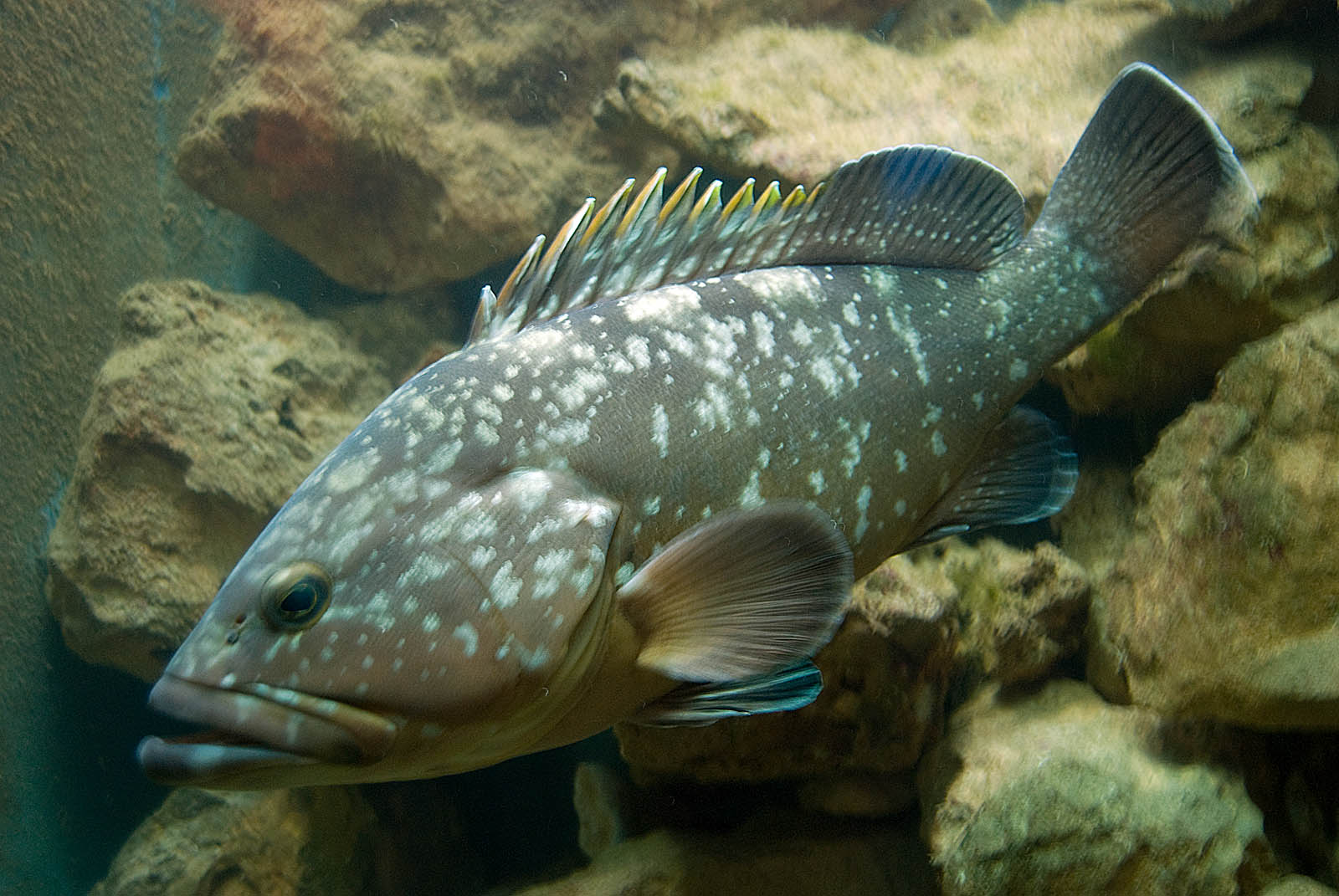 Kirnja